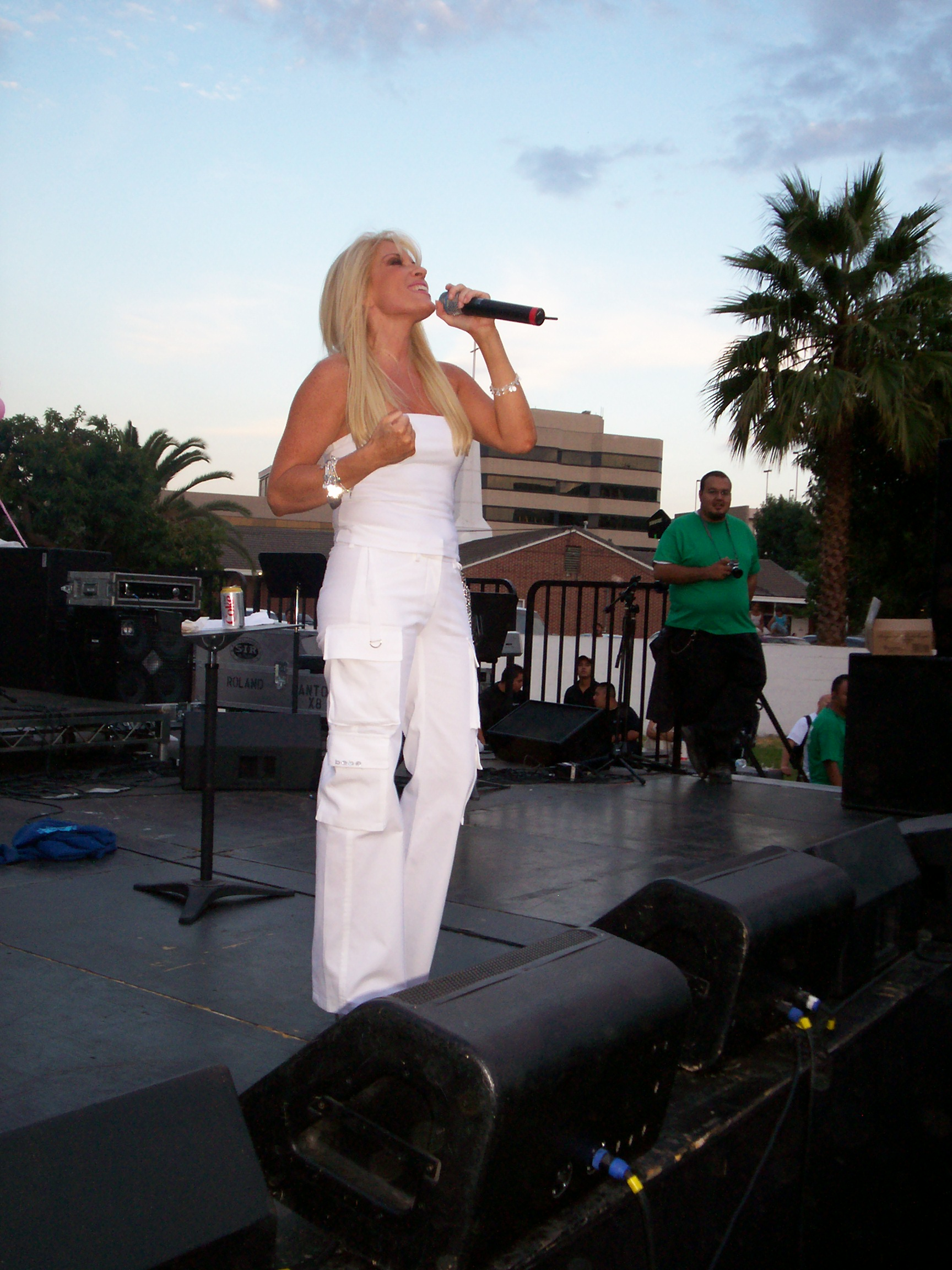 Yuri en show callejero en L.A.